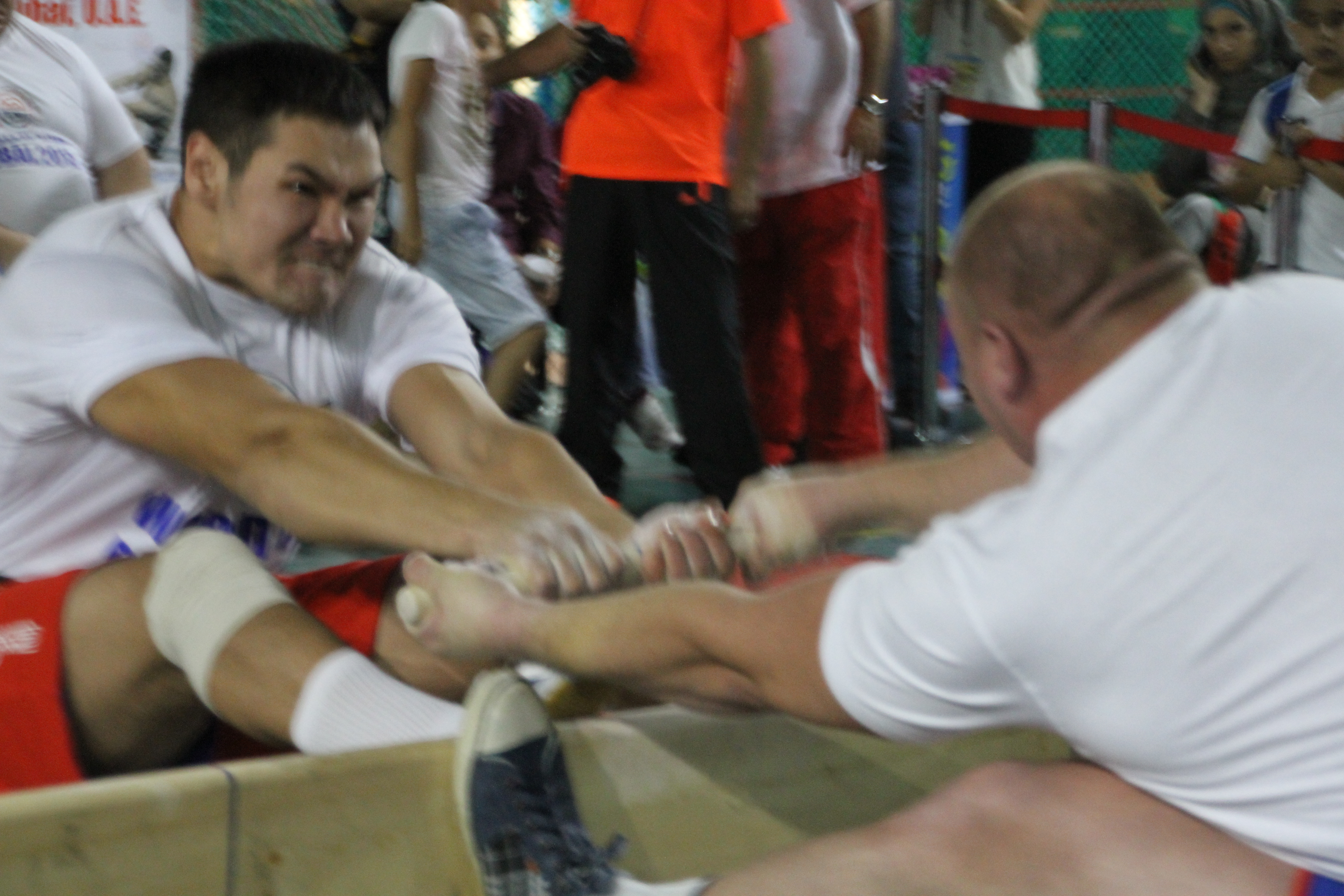 Мас-рестлинг - Федор Федоров и Виктор Колибабчук на чемпионате России 2014 г. в г.МосквеСаха тыла: Мас тардыһыыта - Федор Федоров уонна Виктор Колибабчук 2014 с. Россия чемпионатыгар, Москва к.